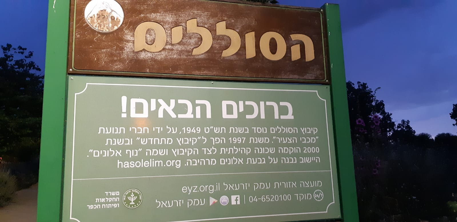 שלוט מידע על קיבוץ הסוללים